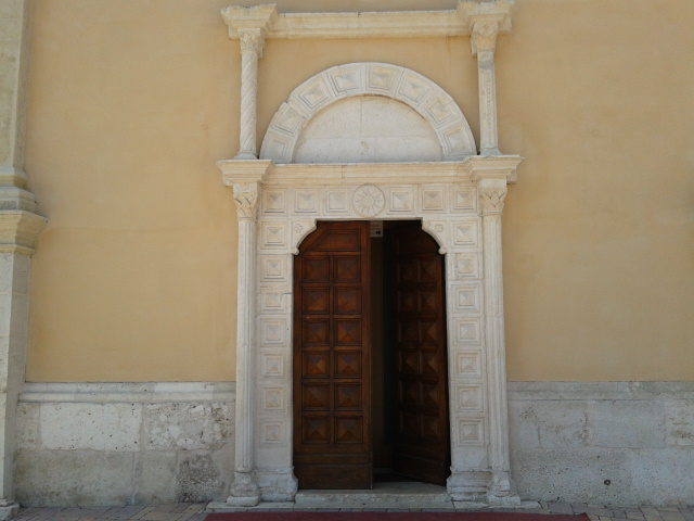 Portale della chiesa della Madonna di Vico in San Giovanni